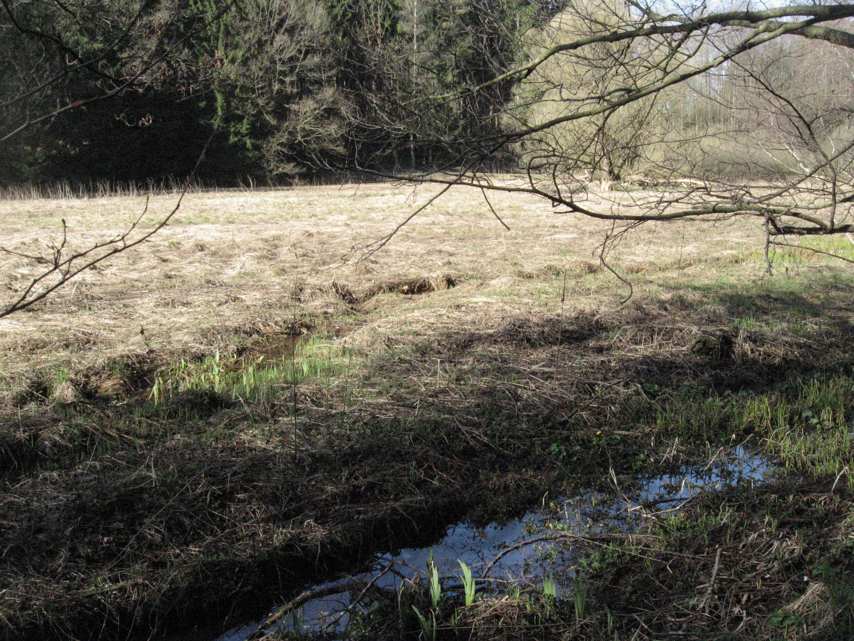 Blick nach W auf die Aue des Rotenbachs zwischen Ellwangen-Glassägmühle und Ellwangen-Ölmühle. Jenseits der feuchten Streuwiese verläuft der Bach nahe dem Waldrand an der anderen Talseite.